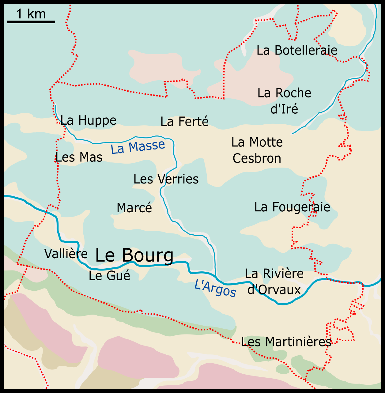 français (fr): Carte géologique de la commune de Loiré, Maine-et-Loire, France. Légende Quartzites, siltites et grès du Briovérien Formations résiduelles d'altérites et colluvions limoneuses des versants Altérites supposées paléogènes Grès armoricain Alluvions et réseau hydrographique